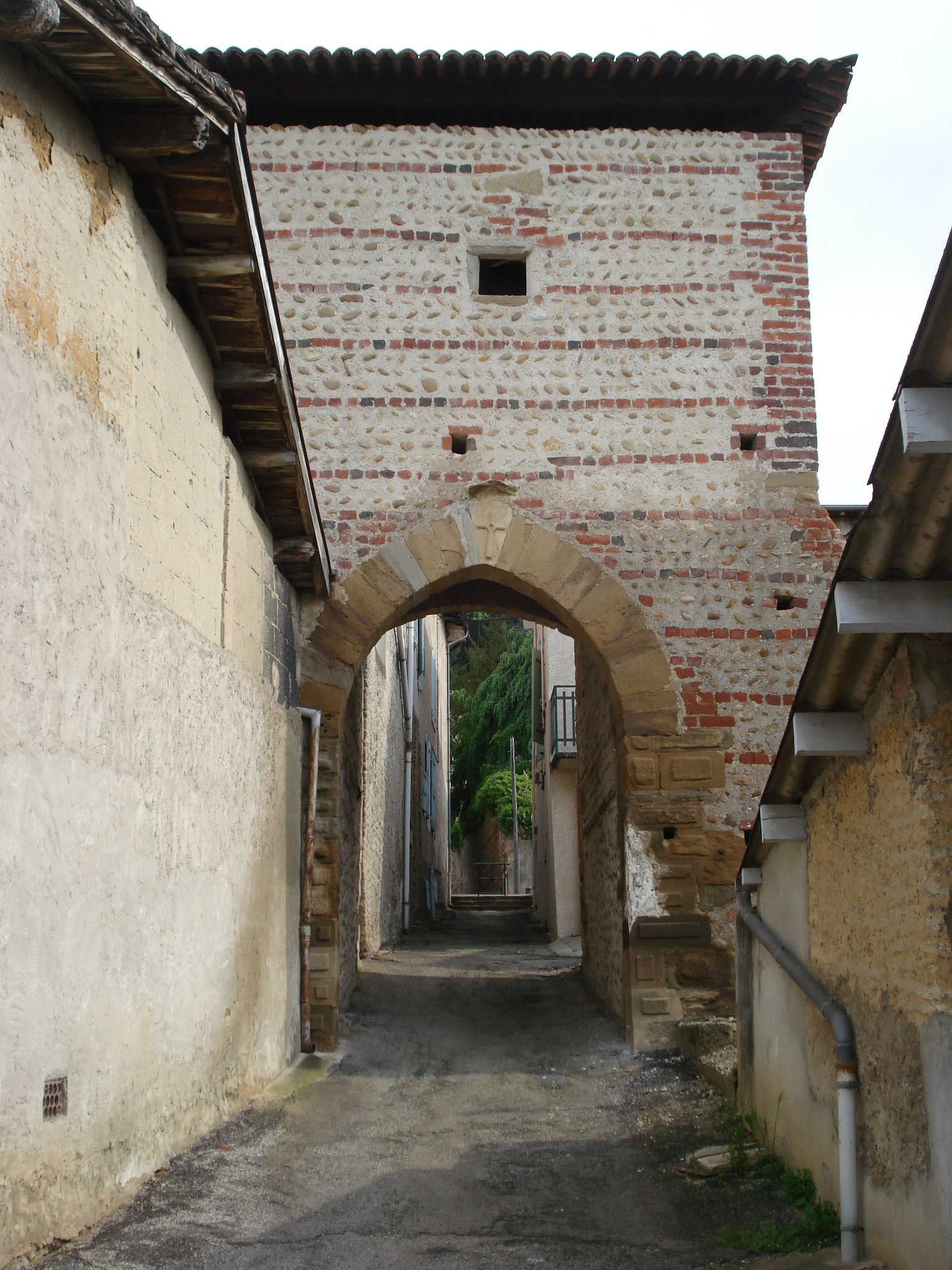 porte de Moras en Valloire dans la Drôme